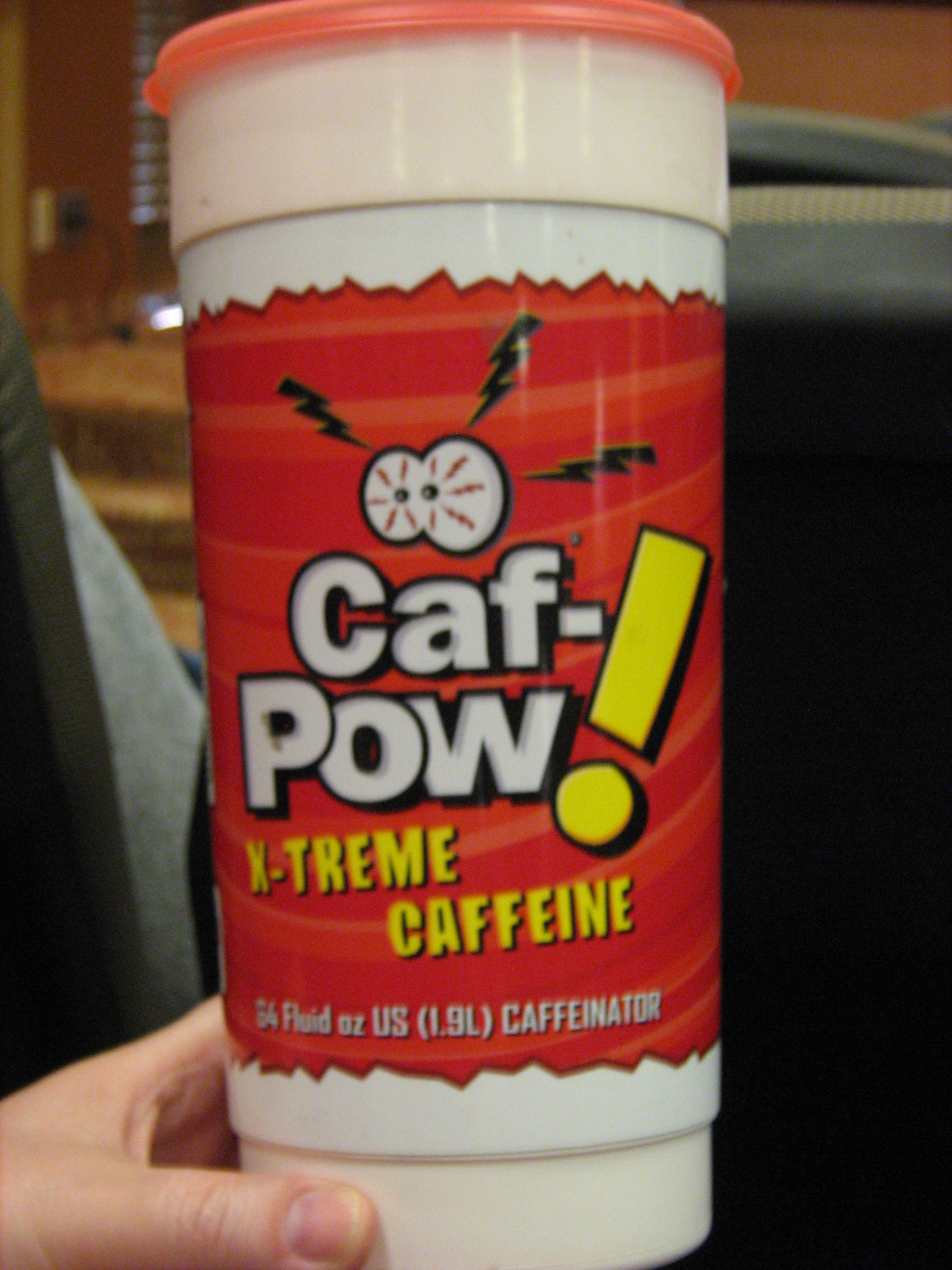 Picture 882